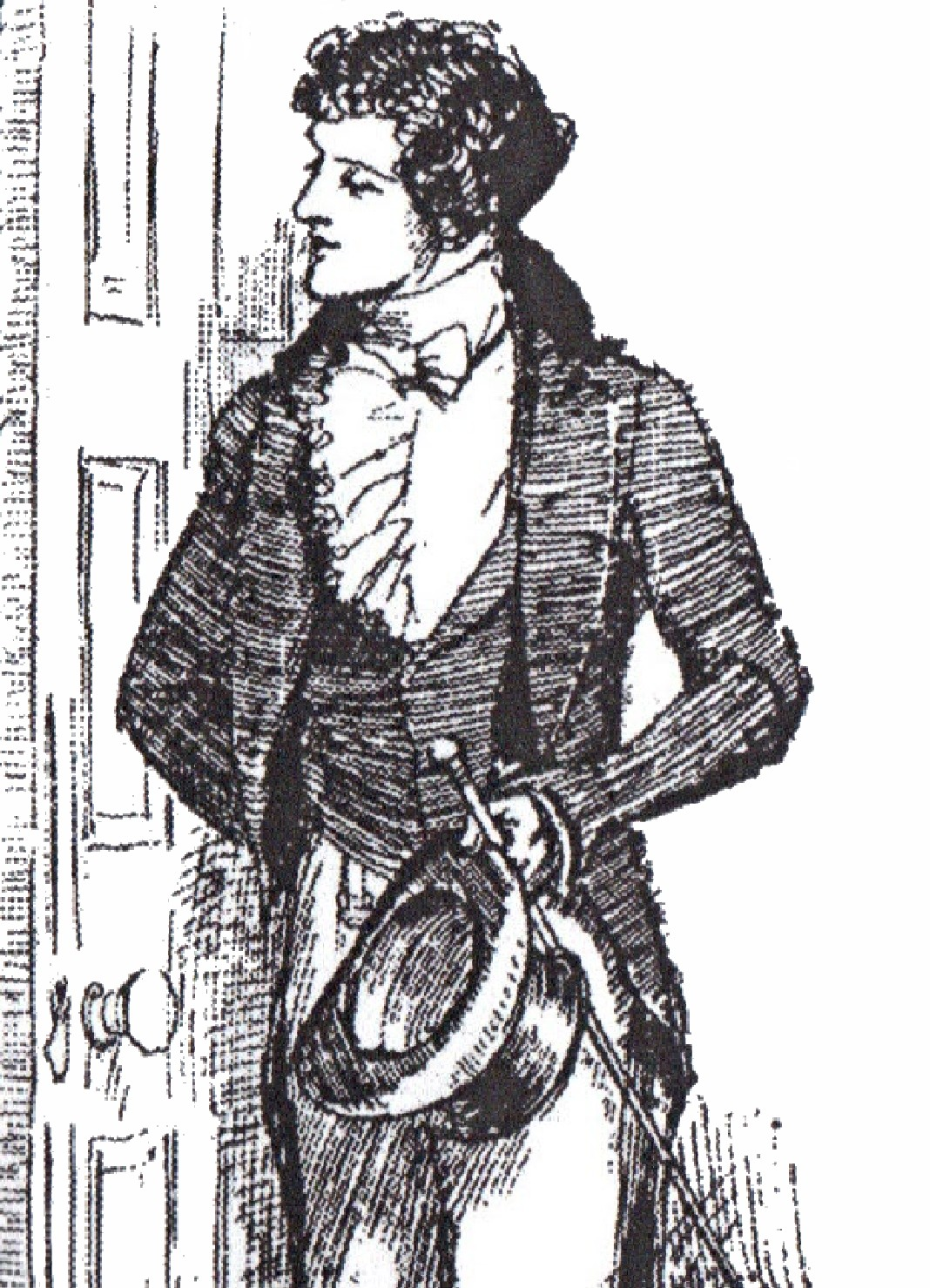 recadrage sur Darcy (portrait)